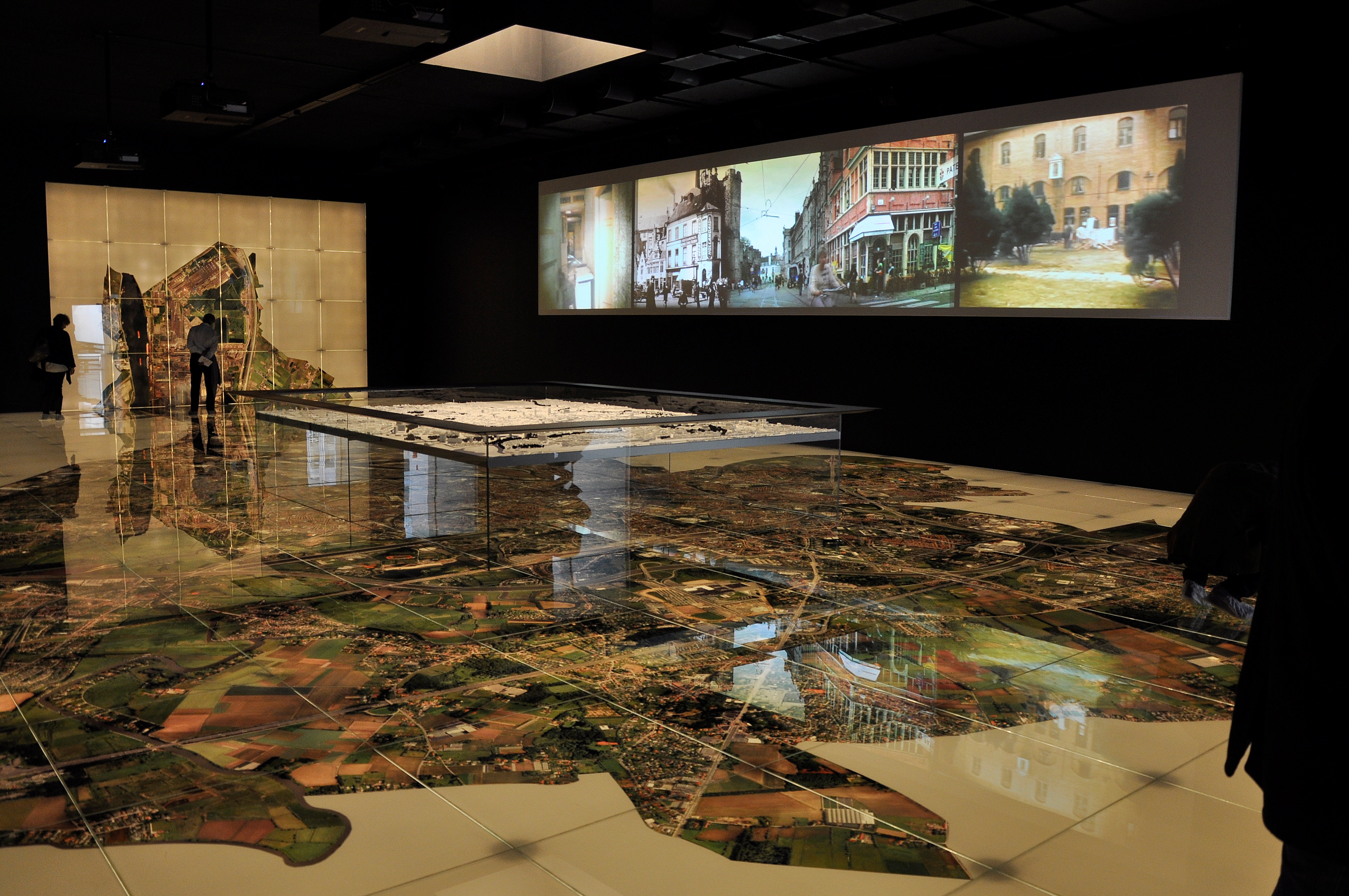 Stadsmuseum Gent, interactieve ruimte